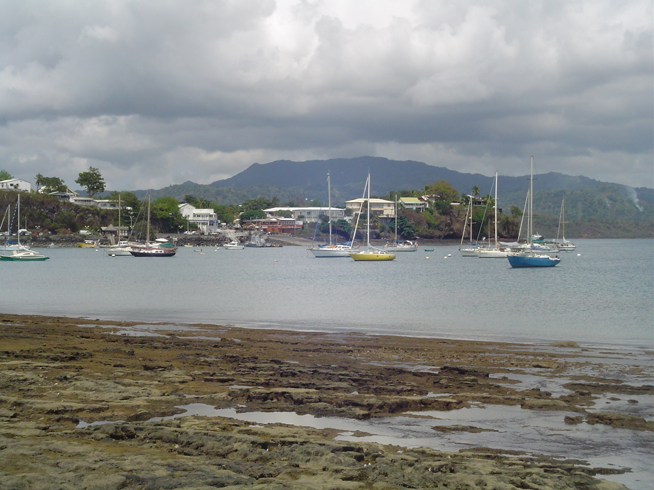 Dzaoudzi